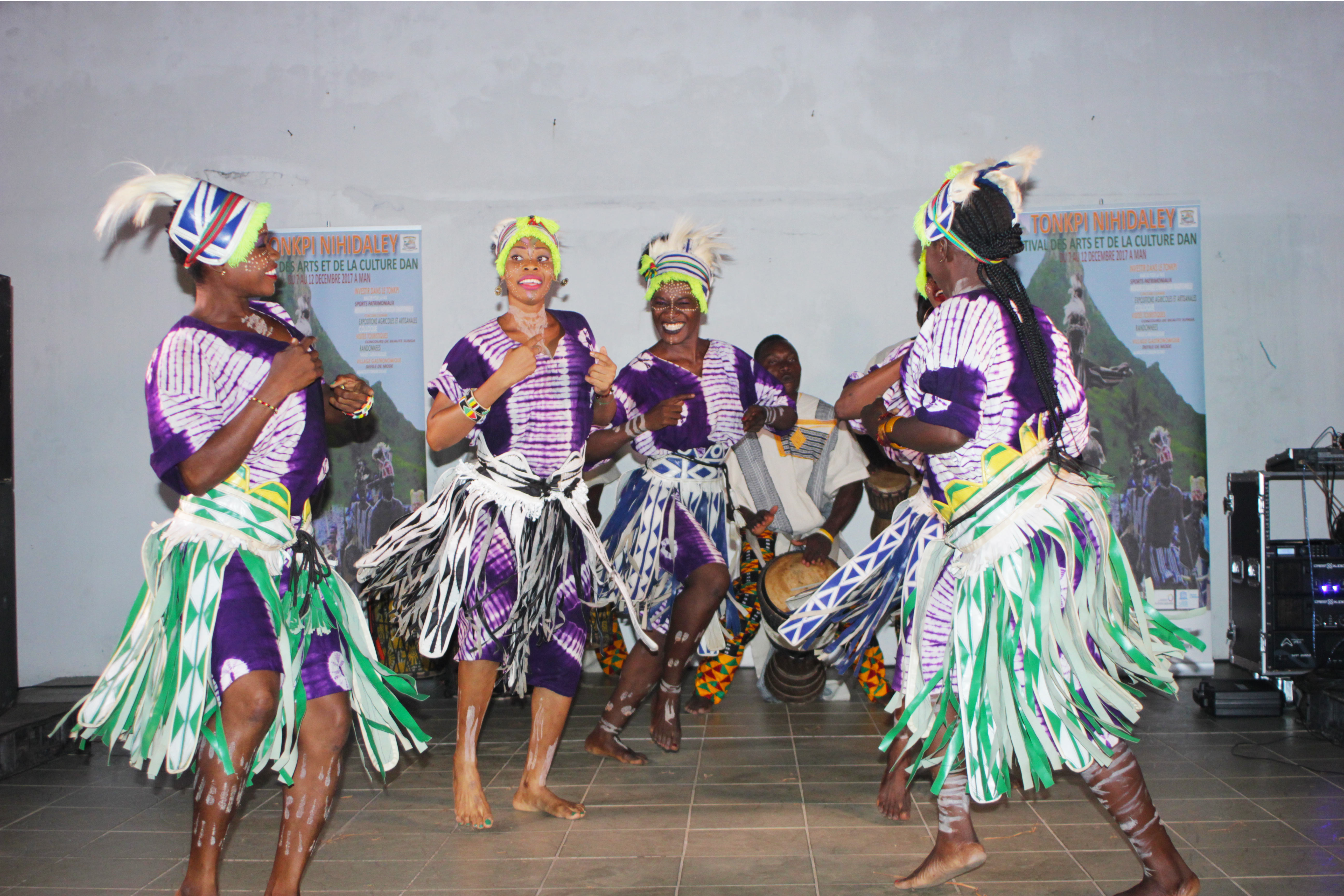 Une danseuse de tématé au sein d'une troupe artistique. This is an image of "African people at work" from Ivory Coast